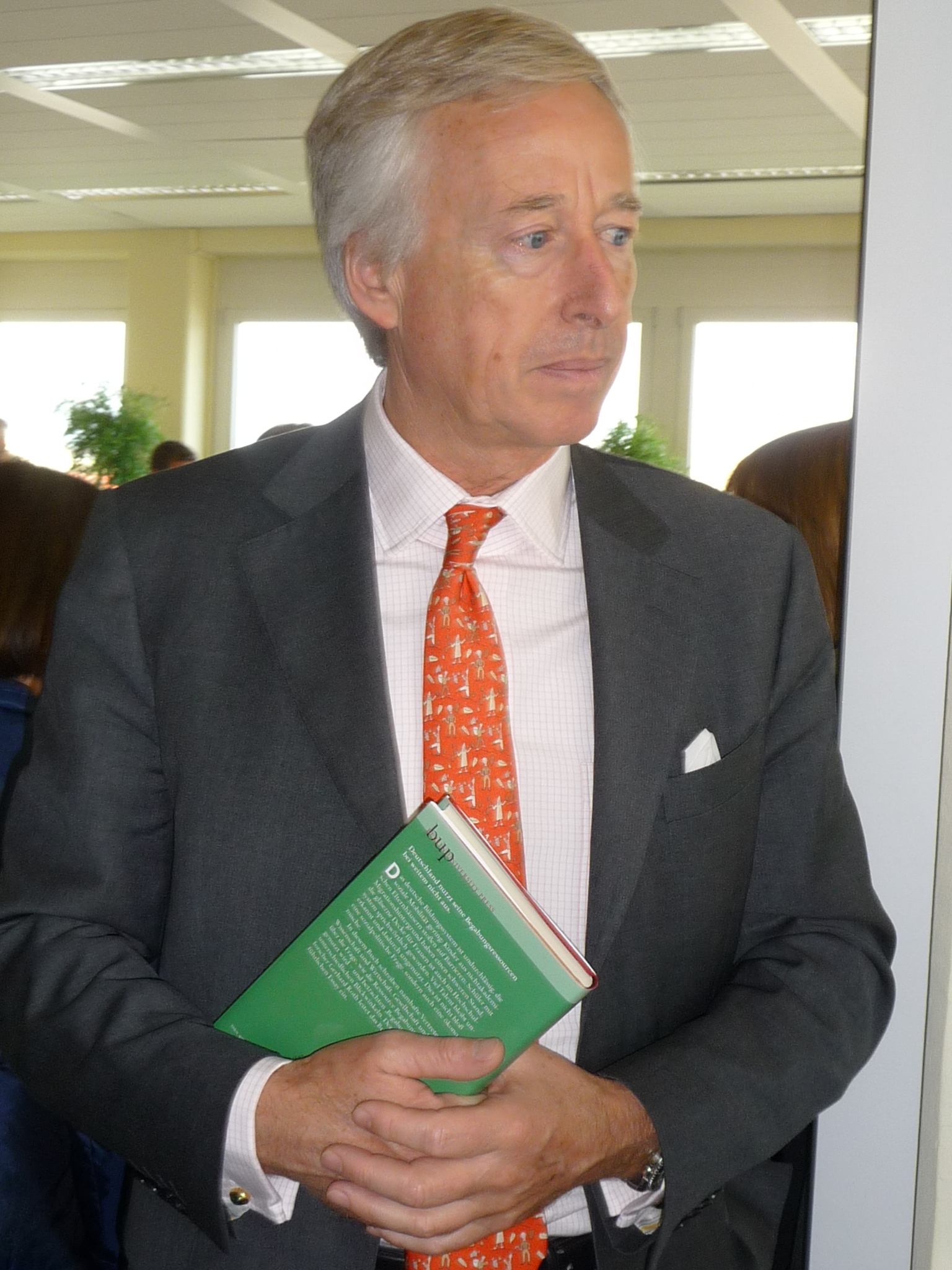 Franz Markus Haniel (* 1. April 1955) ist Vorsitzender des Aufsichtsrats der Franz Haniel & Cie. GmbH und Aufsichtsratsvorsitzenden der Metro AG.